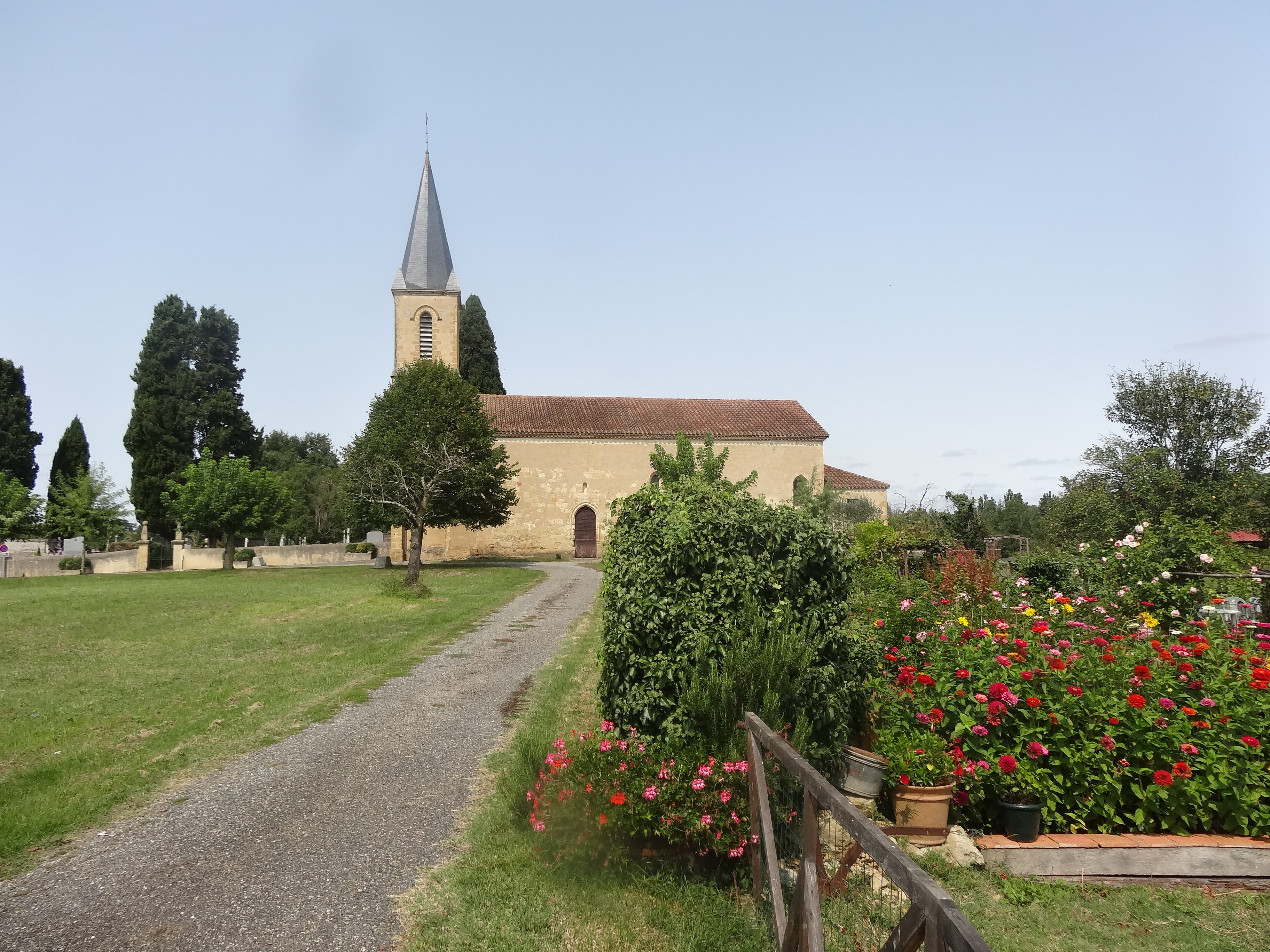 L'église Saint-Martin de Sère vue depuis le sud.